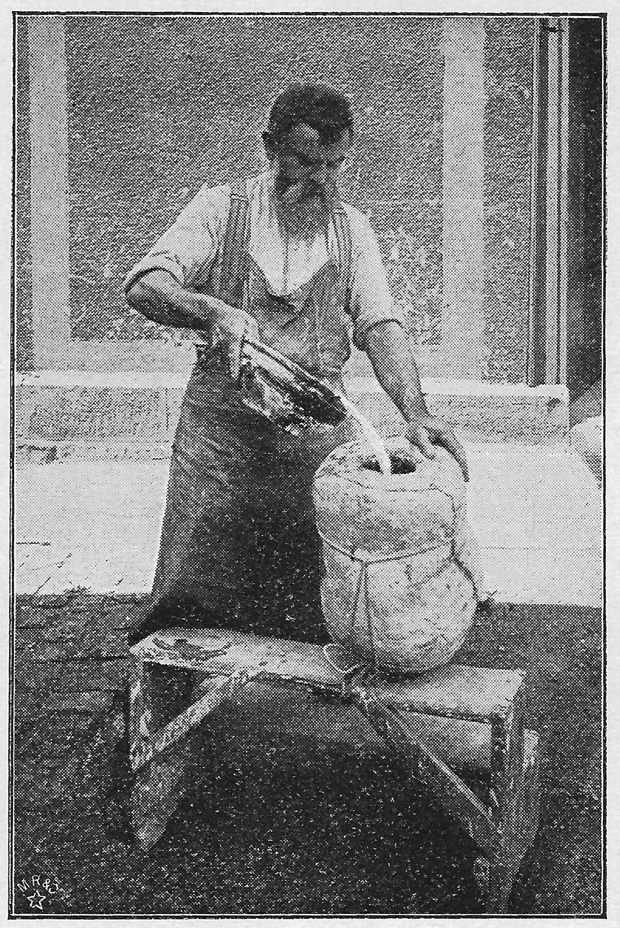 Adolf von Donndorf beim Herstellen eines Gipsabgusses in seinem Atelier in Stuttgart